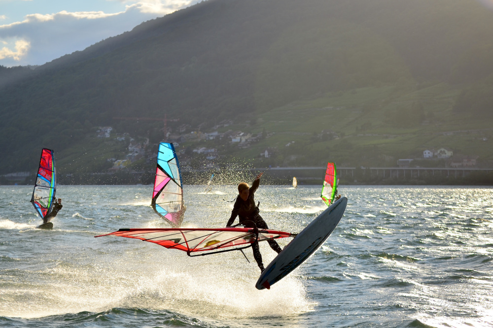 Der "Bergluft" beschert den Wassersportler von den Jurasüdfuss-Gewässern öfters optimale Surf und Segelbedingugen.